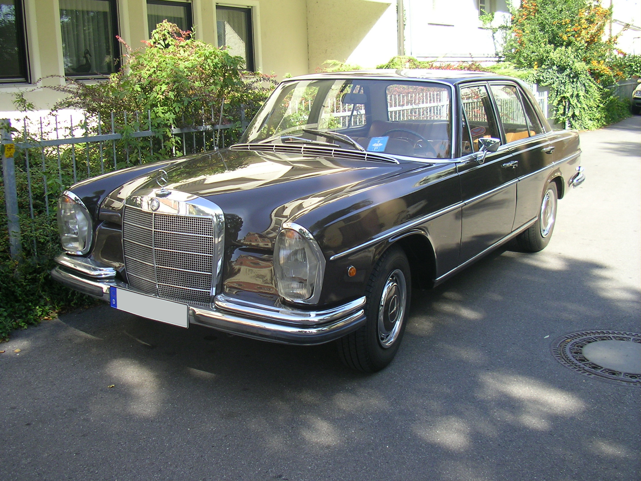 Mercedes Benz W108 250S Front